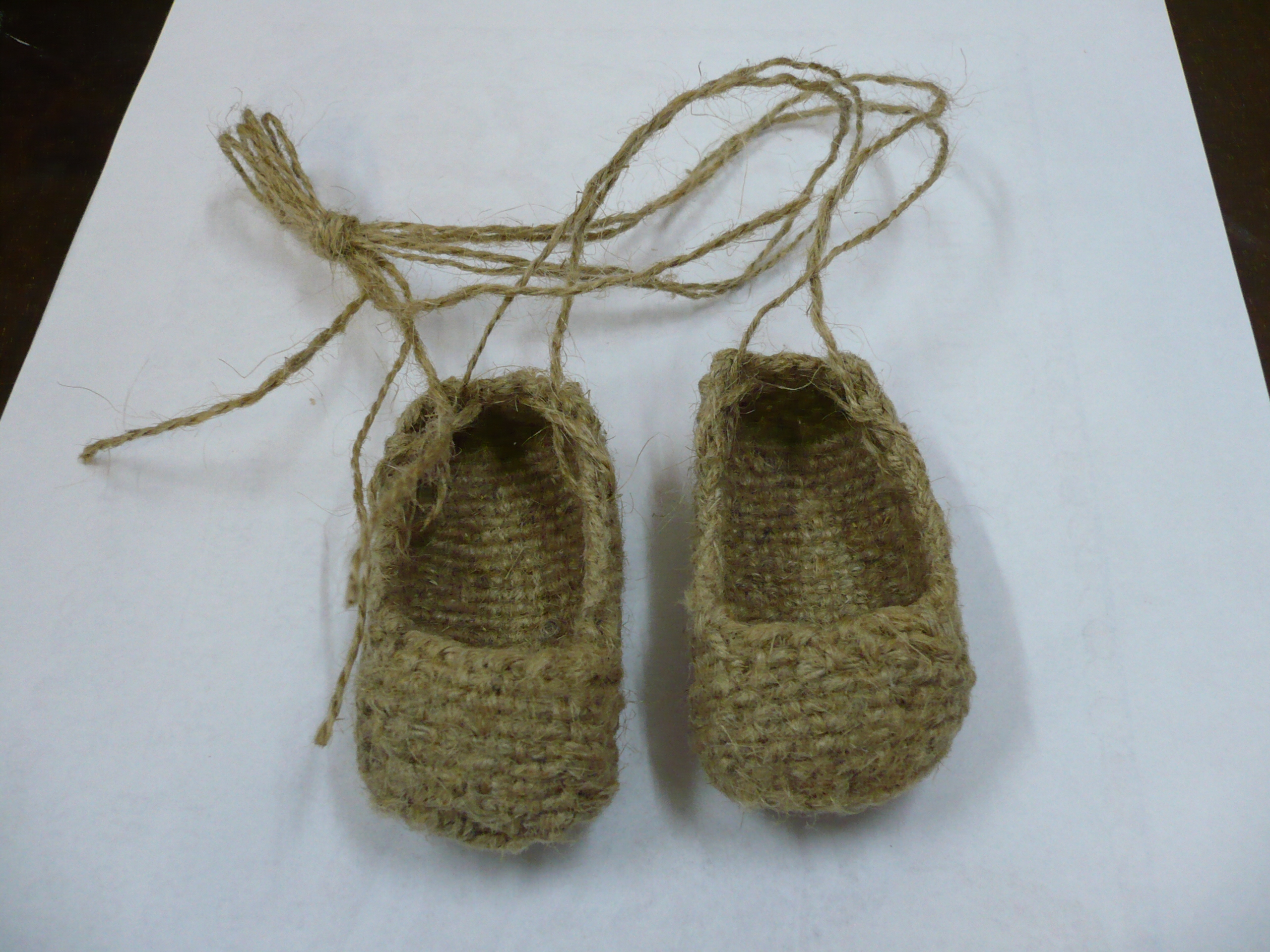 Лапти из пеньки сувенирные. Дом ремесел, г. Старый Оскол. 2008.